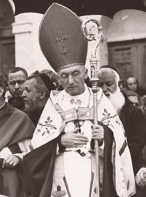 Giuseppe Venturi, arcivescovo di Chieti-Vasto